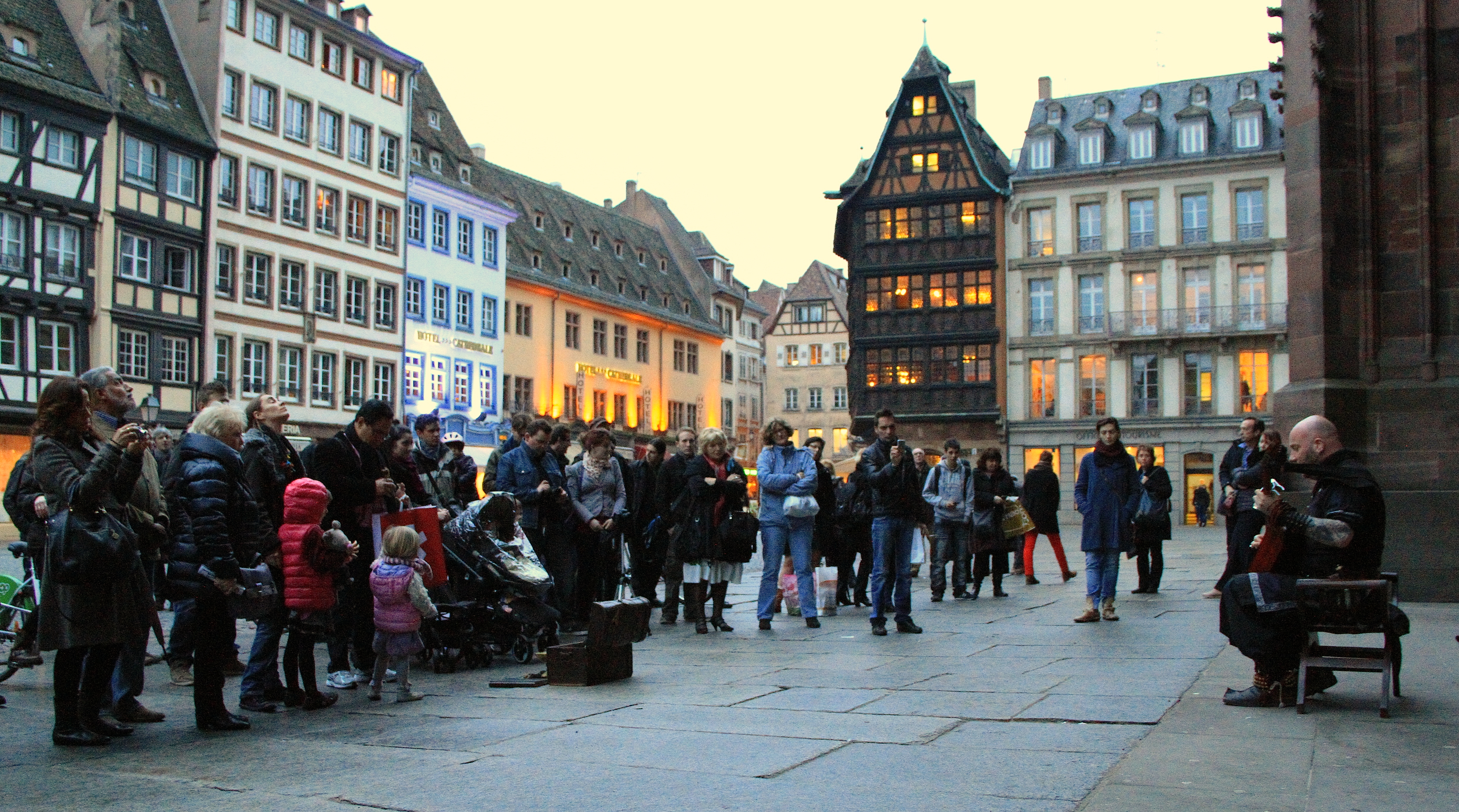 Strasbourg Luc Arbogast parvis de la Cathédrale mars 2013